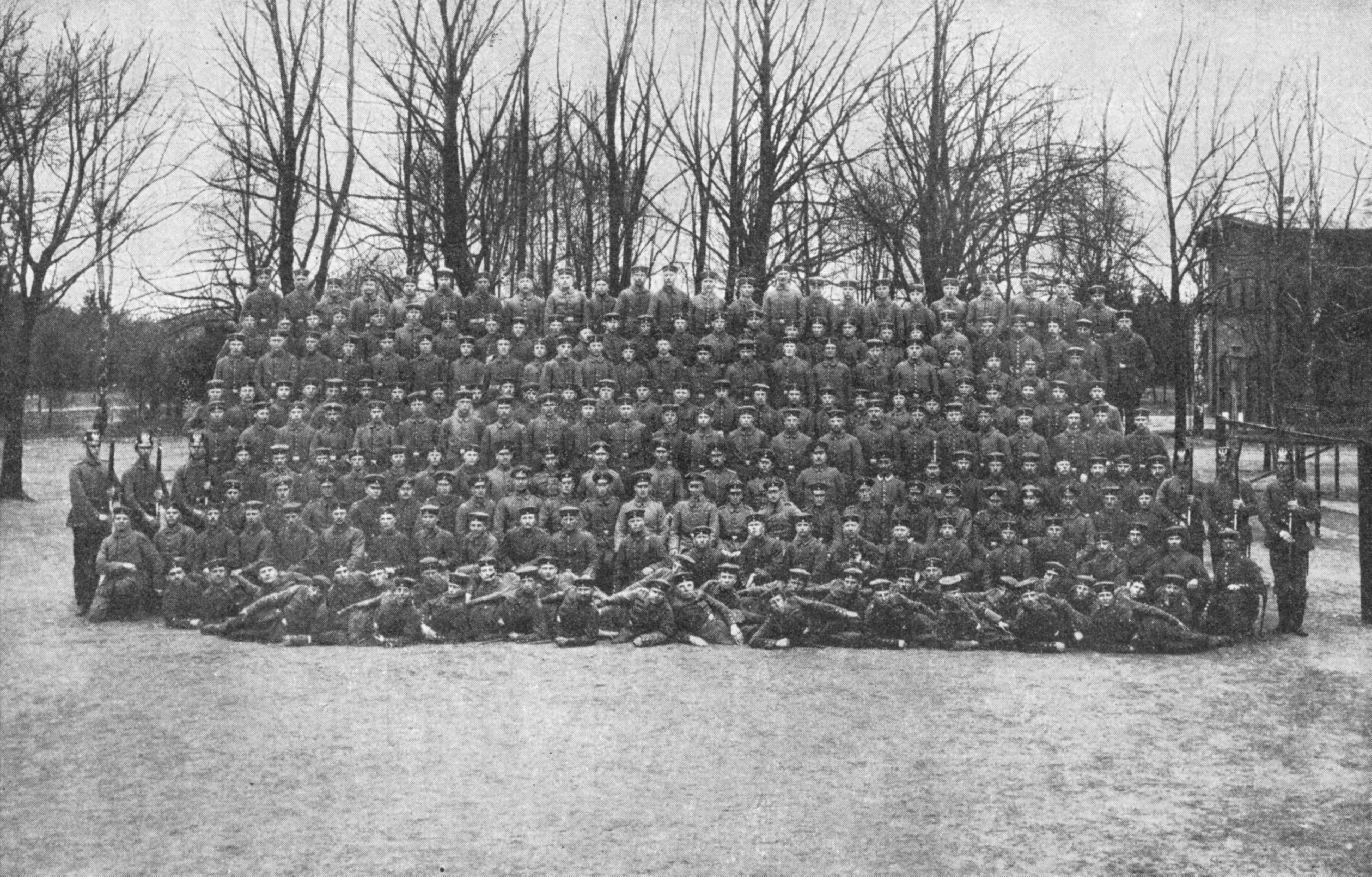 Description